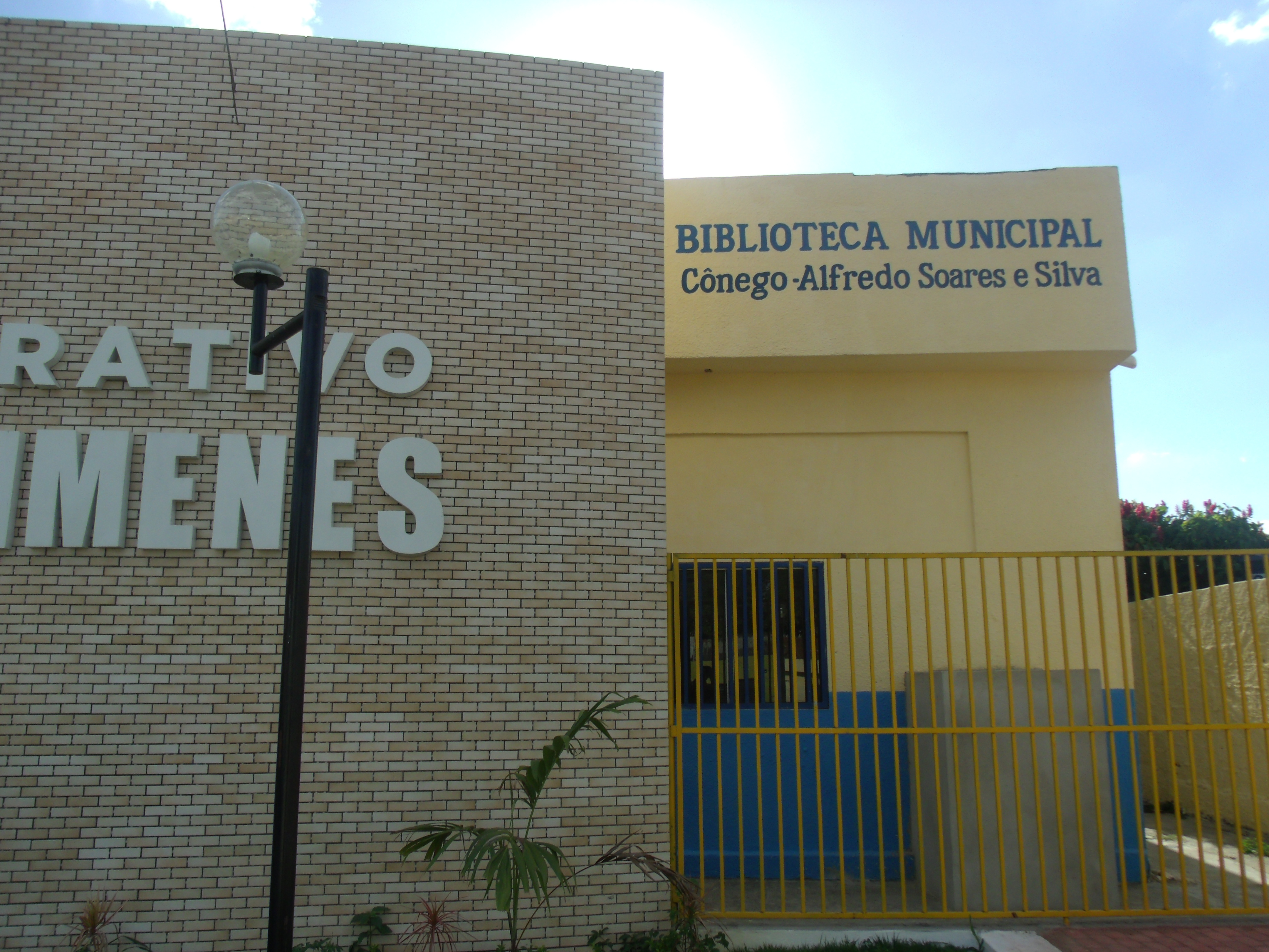 Fachada externa da Biblioteca Municipal de Ibiapina, Ceará.